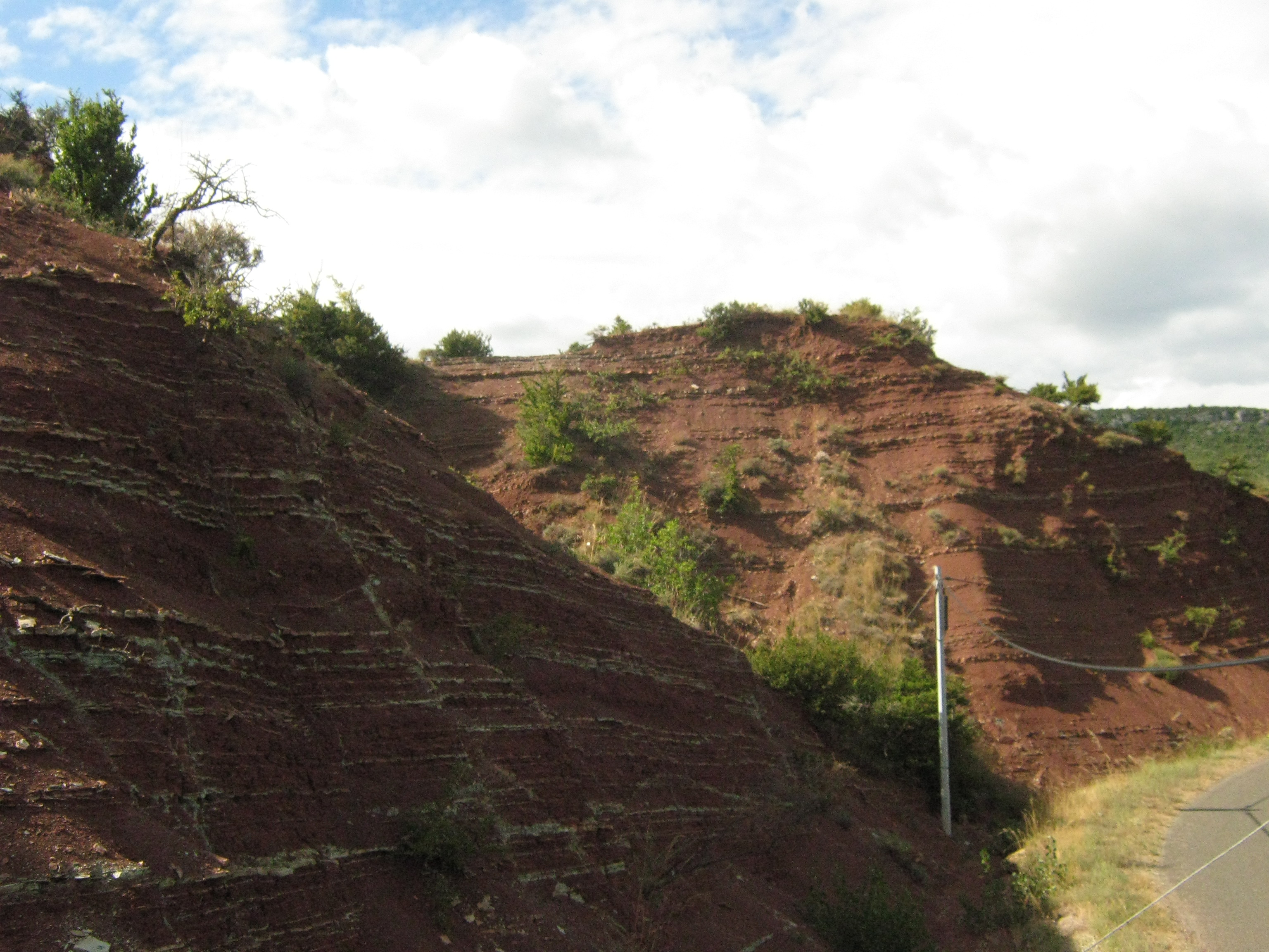 ruffe